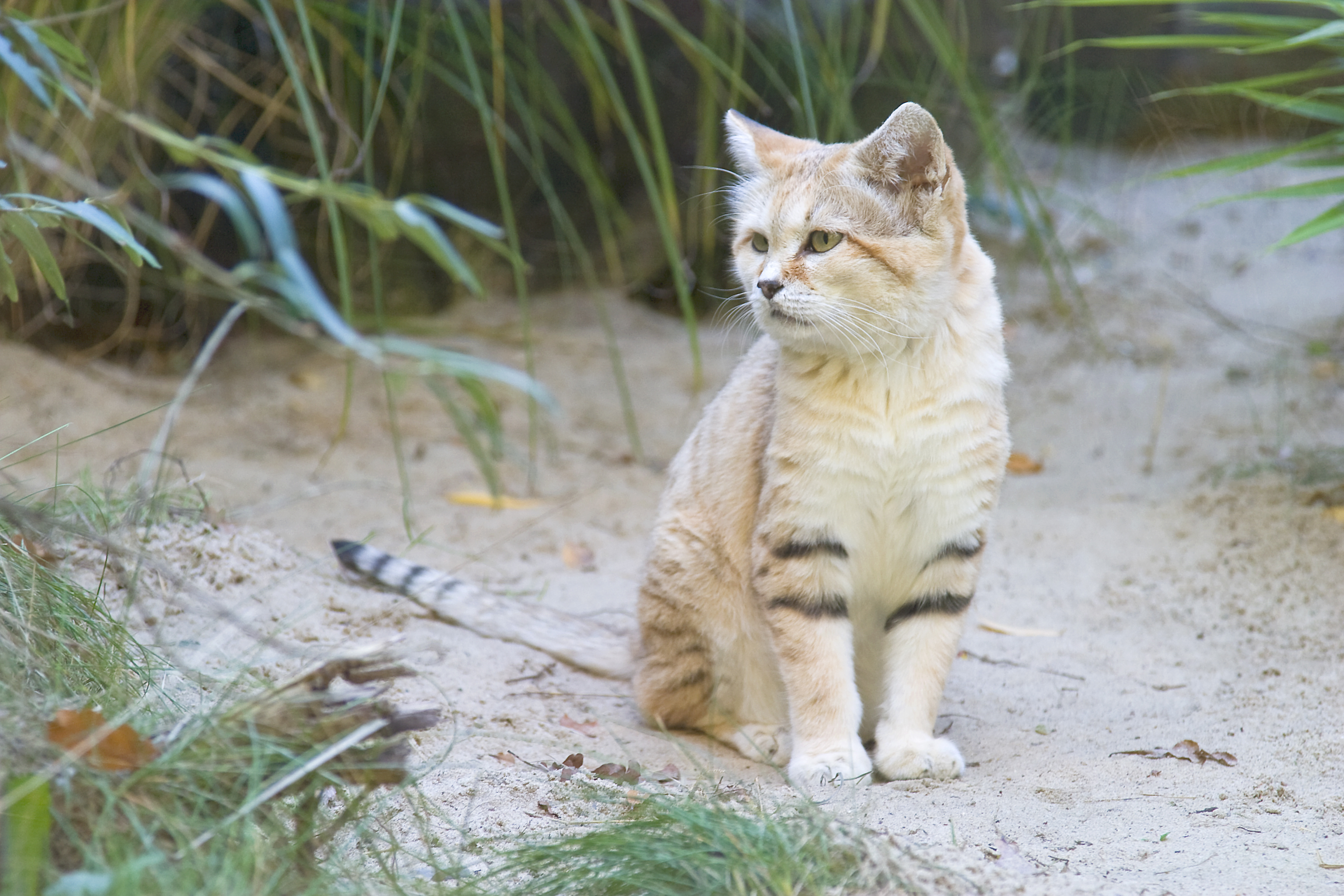 im Zoo Osnabrück